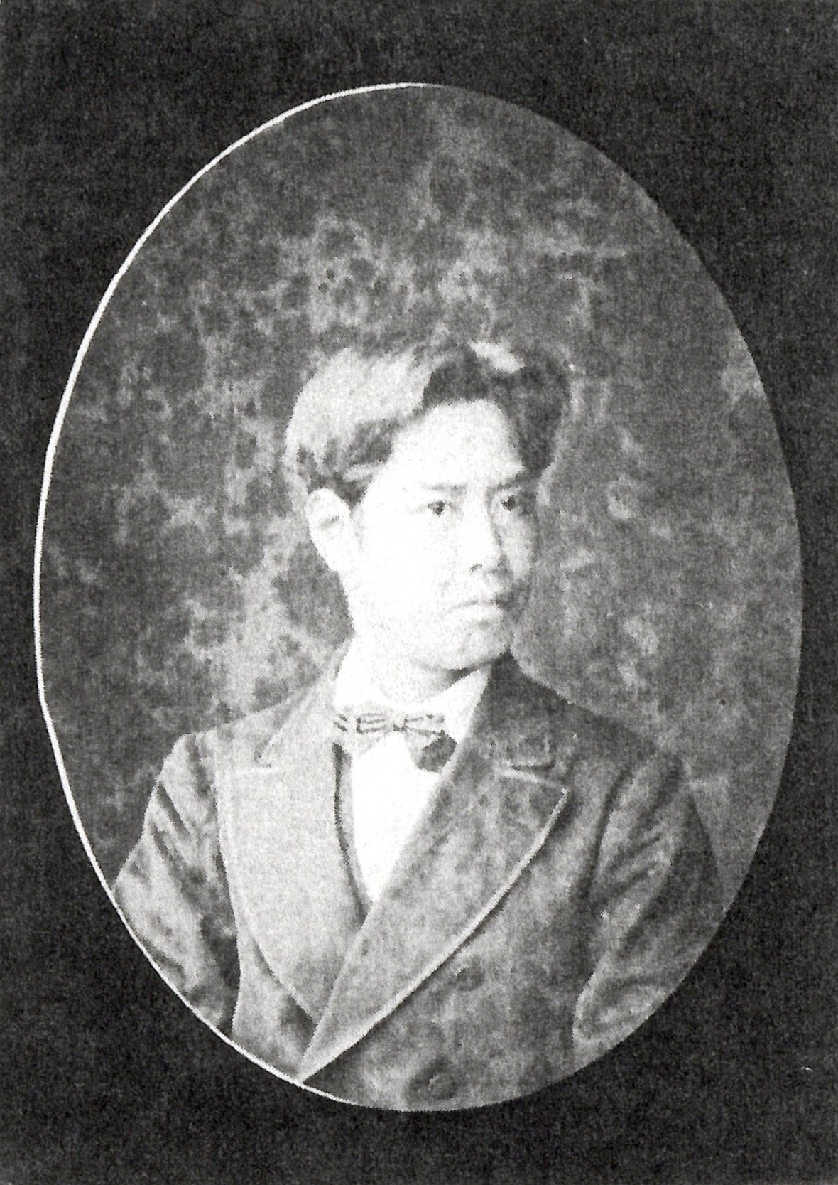 内藤政養の肖像写真。